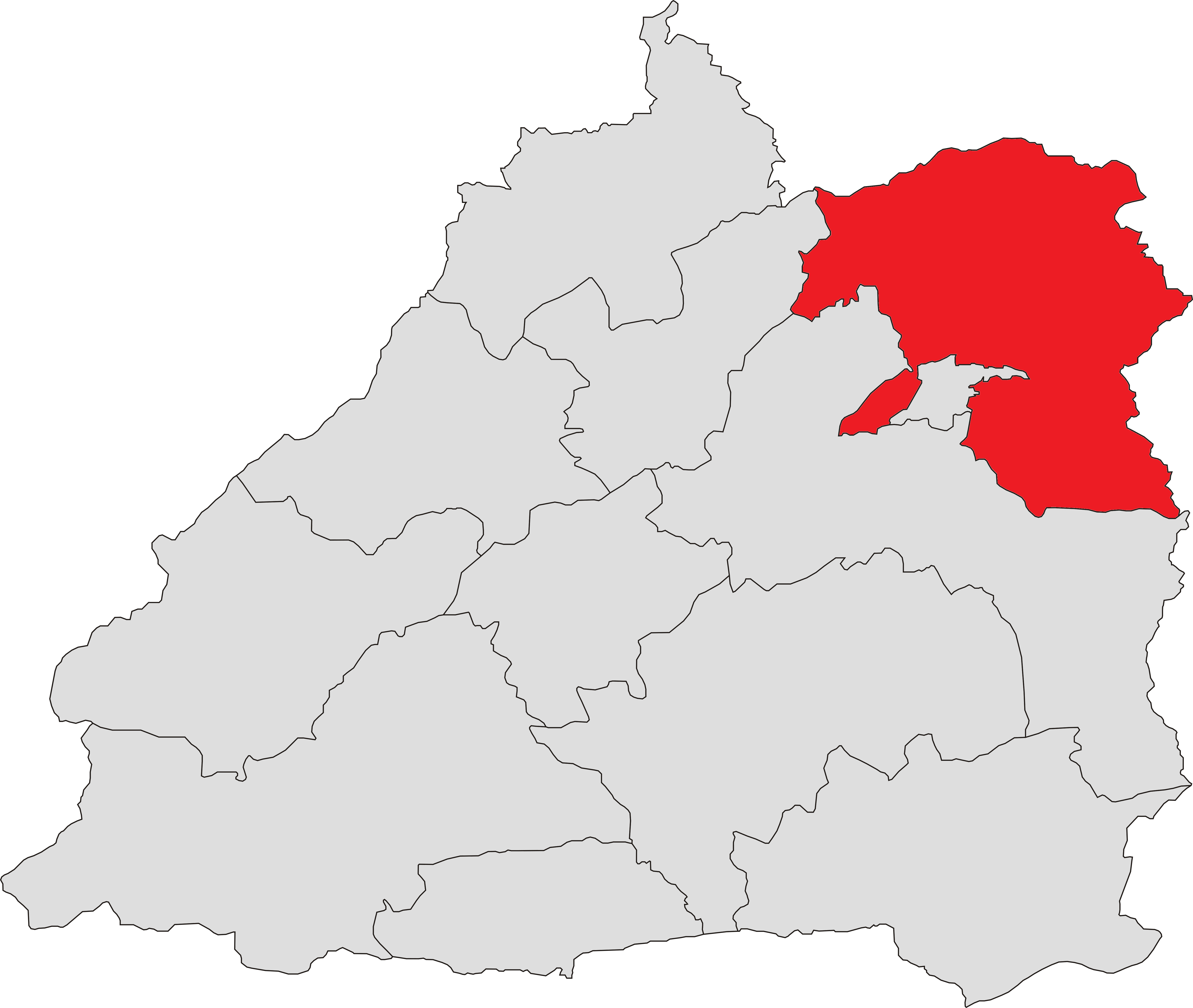 中文（中国大陆）: 芒市芒市镇位置图